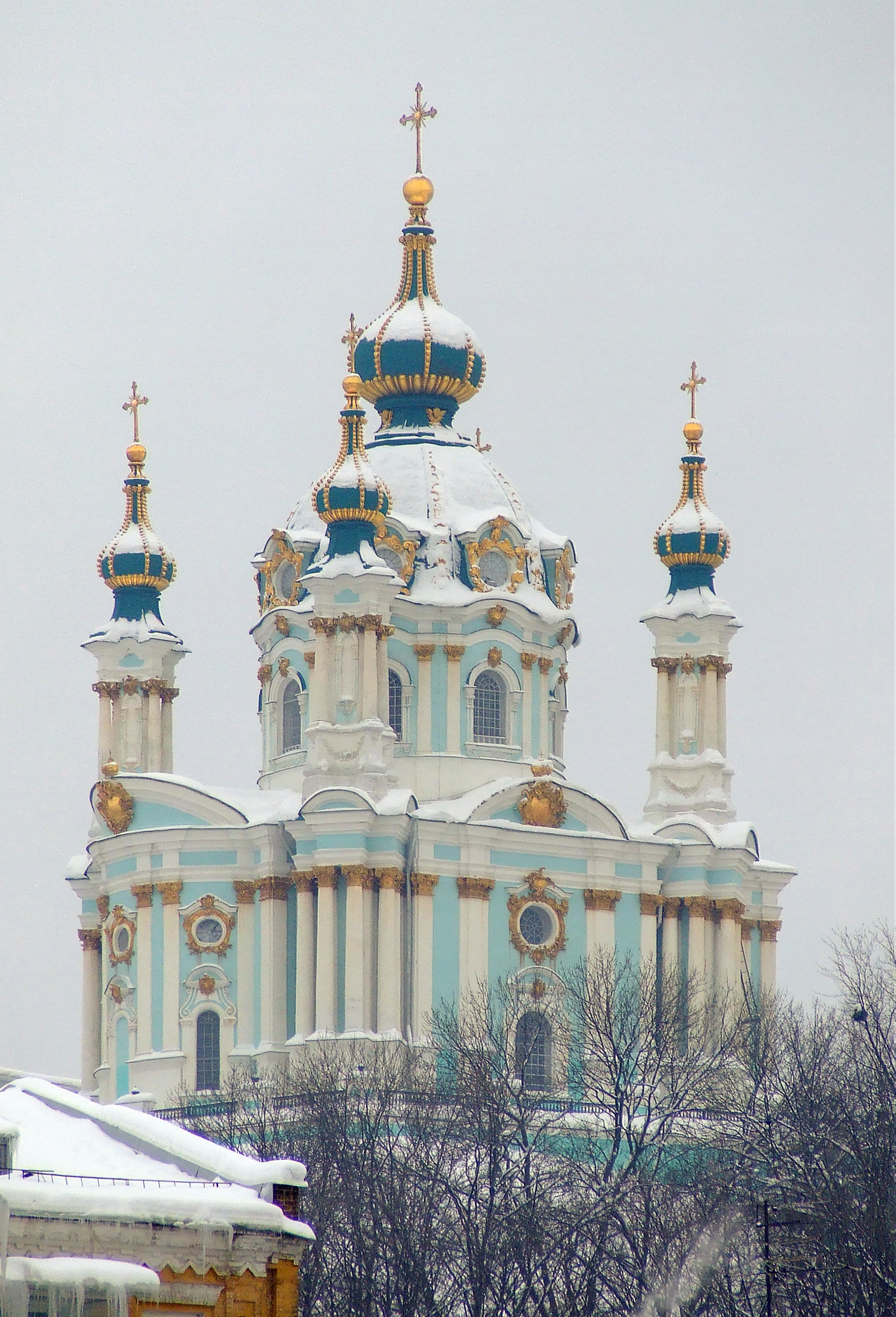 Церква Андріївська, Київ, Андріївський узвіз, 23